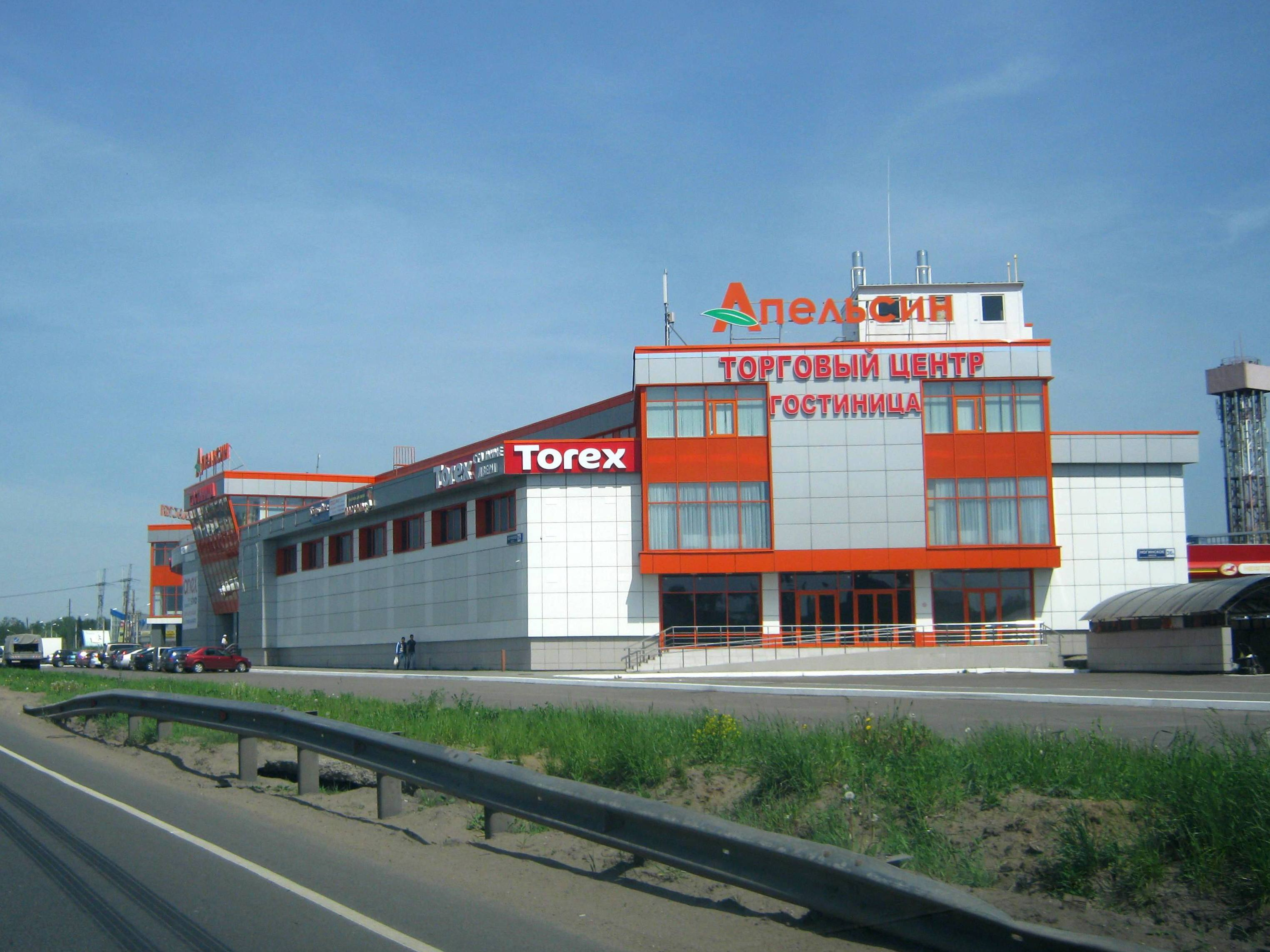 ТЦ "Апельсин" (Электросталь)